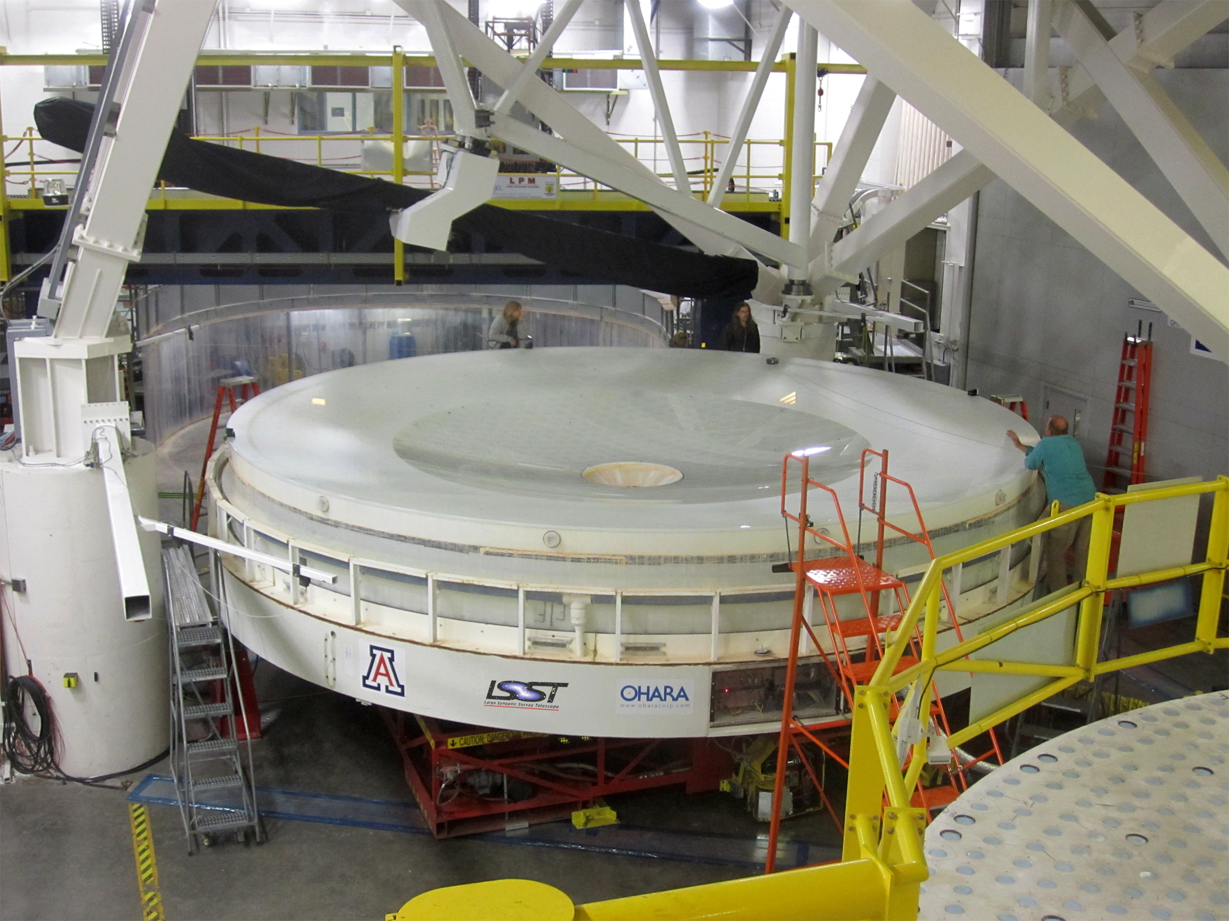 LSST telescope : Mirror M1/M3 (mars 2013)